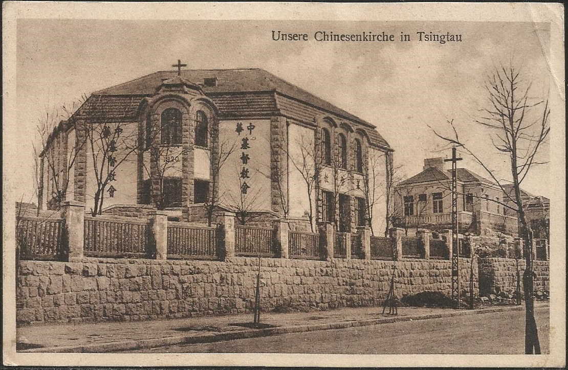 青岛上海路教堂